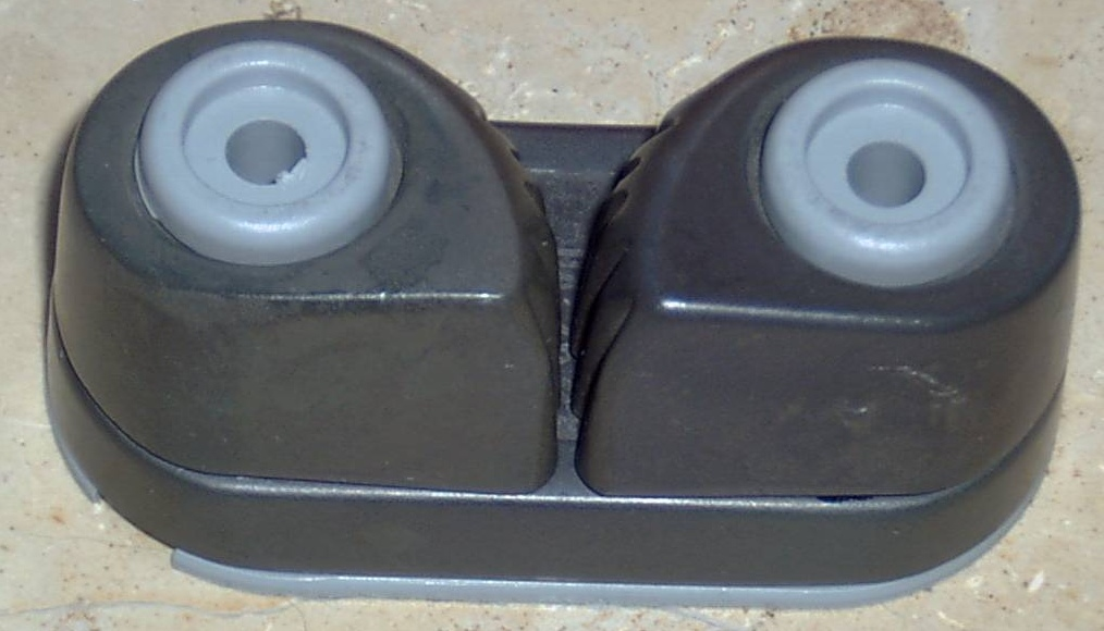 Curryklemme (HOLT ALLEN HA 77)